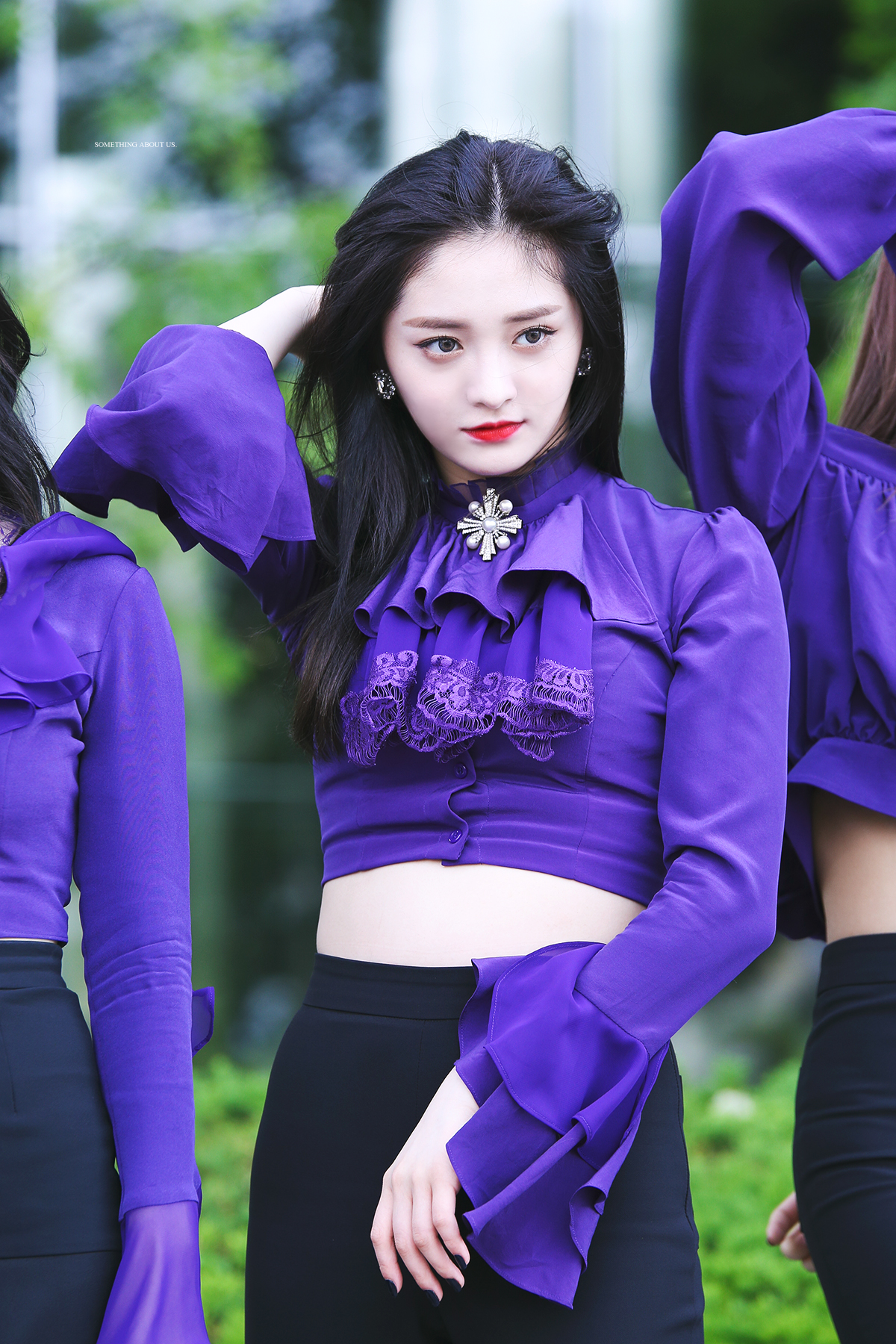 170520 미니 팬미팅